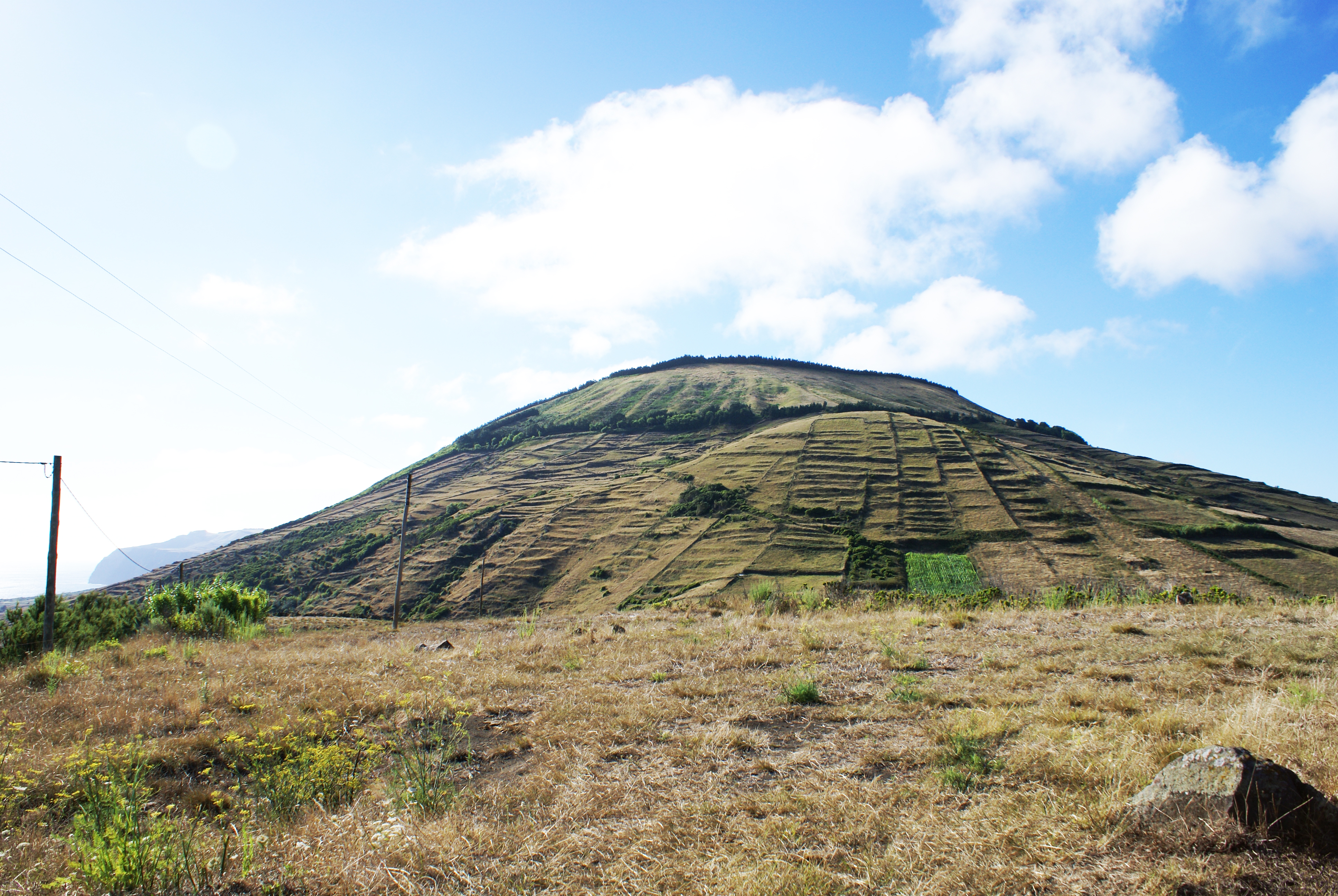 Portela, Santa Cruz da Graciosa, ilha Graciosa, Açores, Portugal